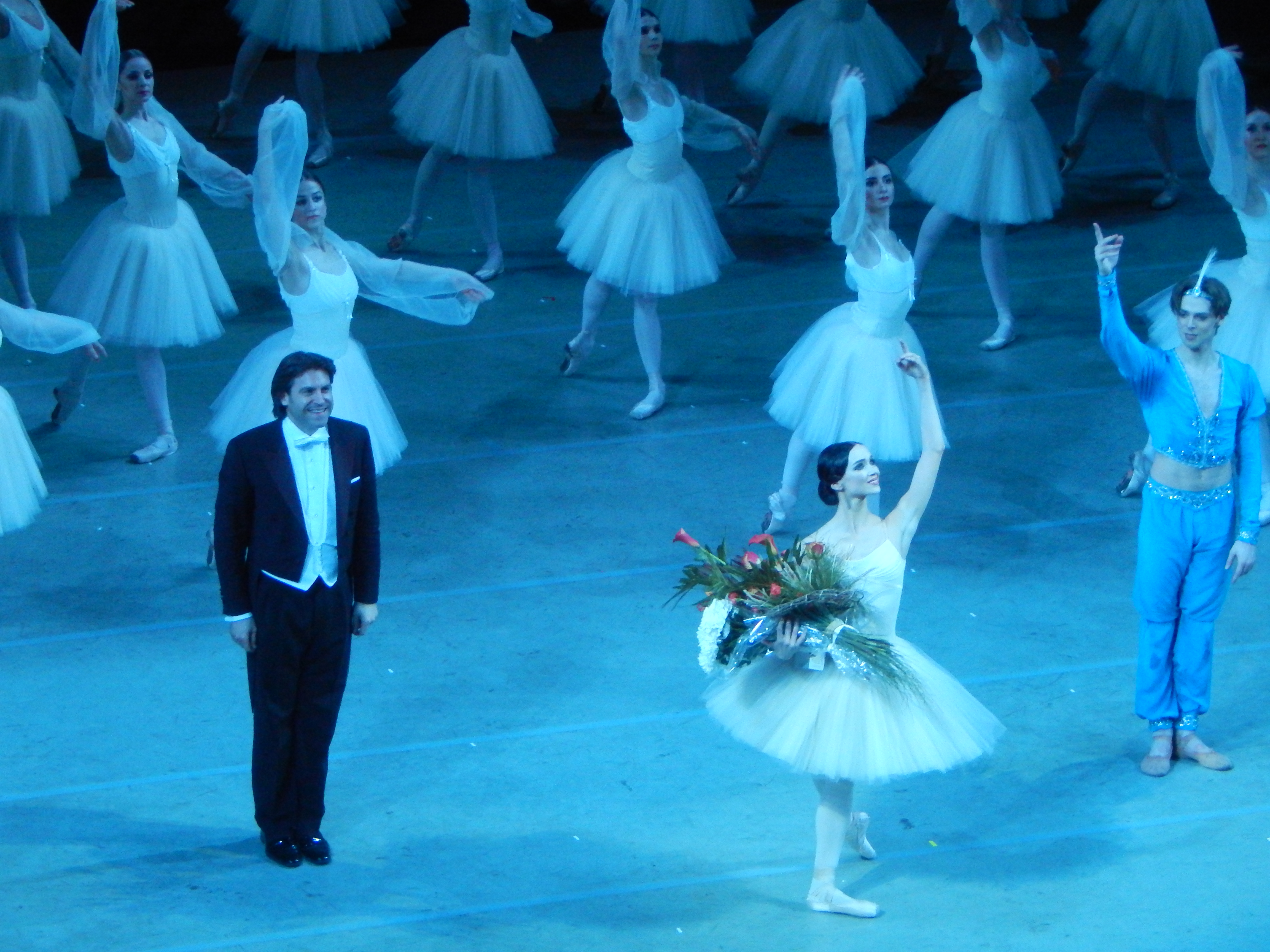 Мариинский театр, балет «Баядерка», 18 мая 2017 Окончание спектакля